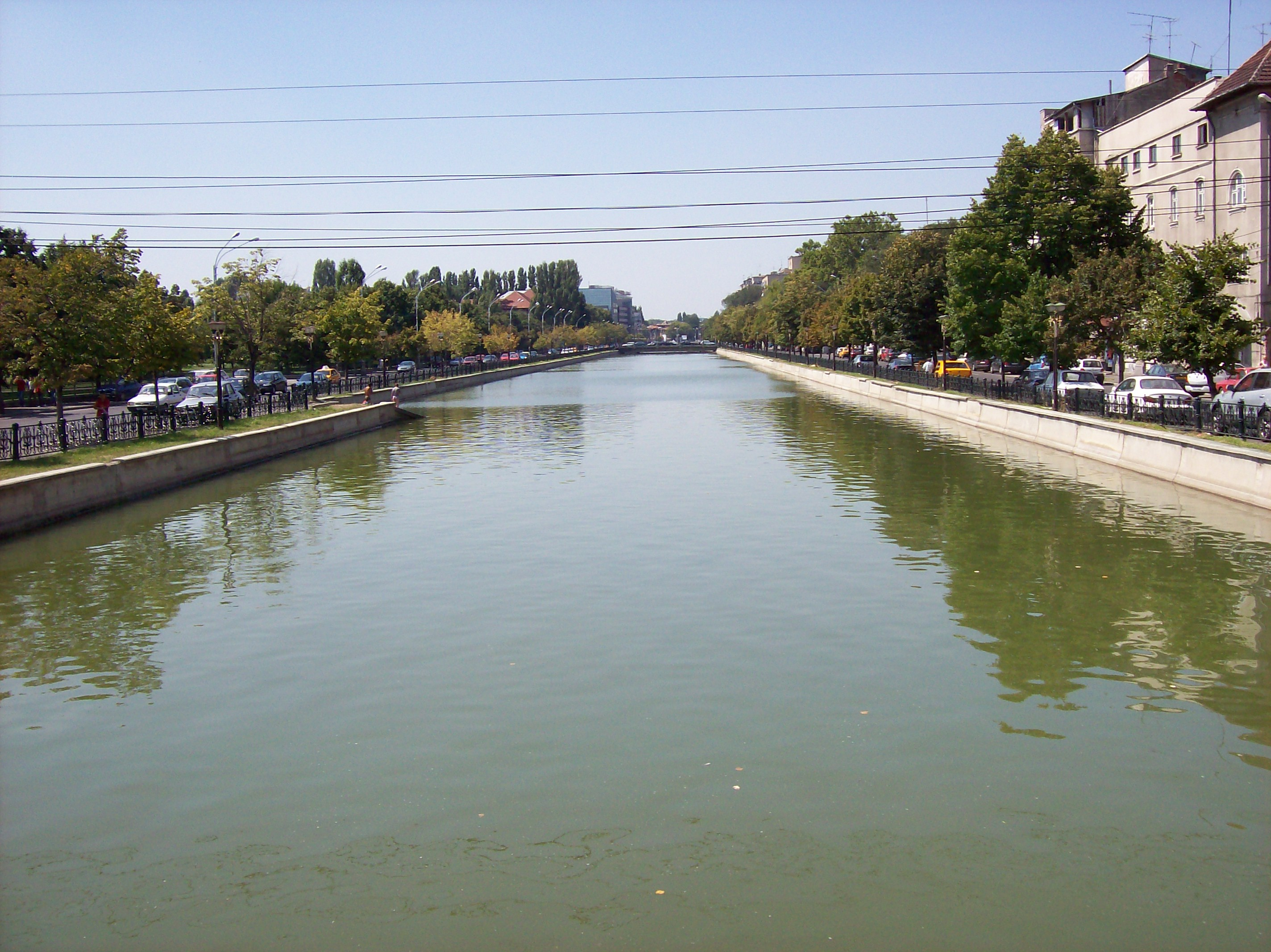 Dambovita in Bucharest